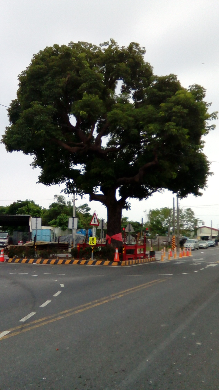 通往崁頂的產業道路可見到